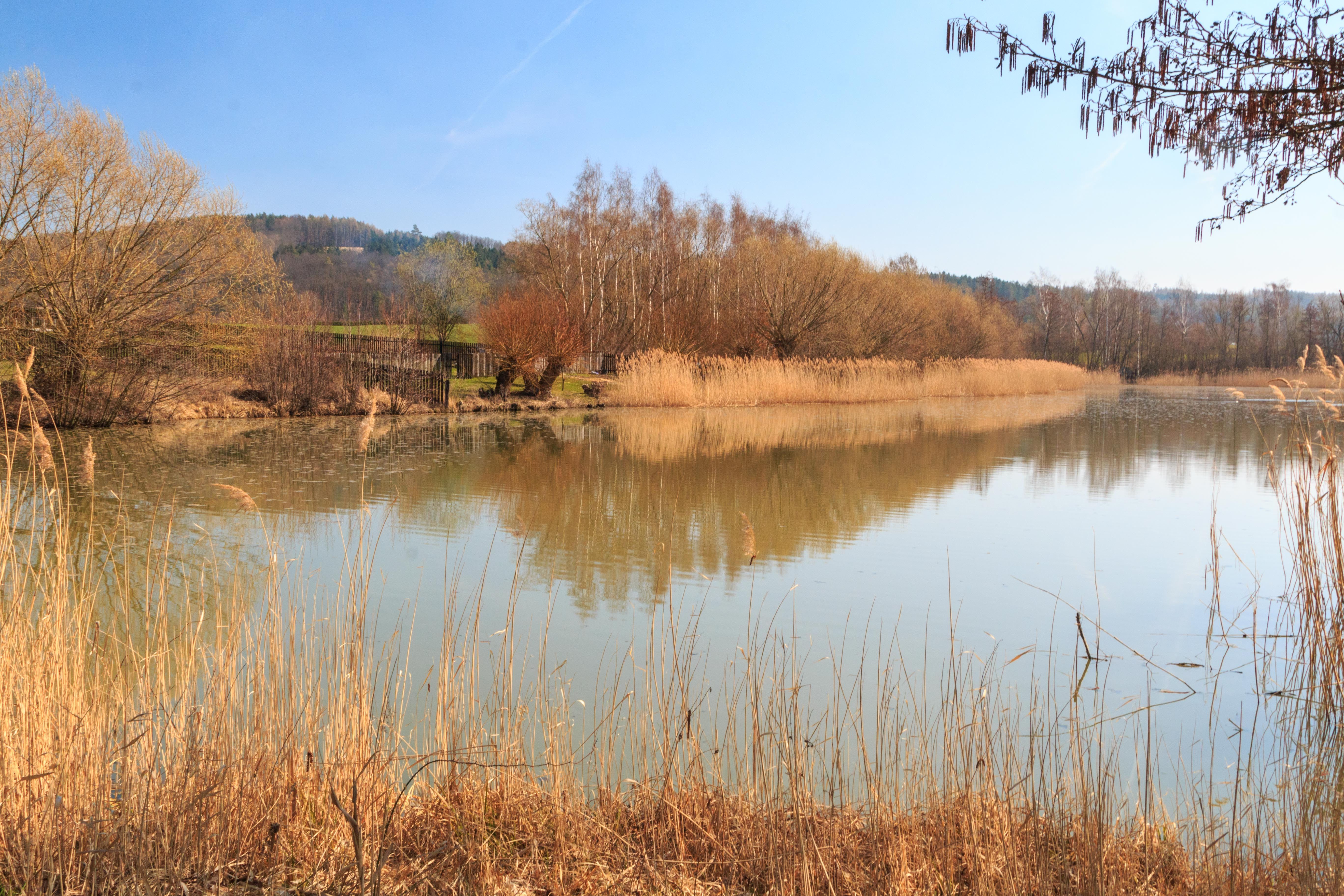 Rybník Podlesník u Dolního Bousova